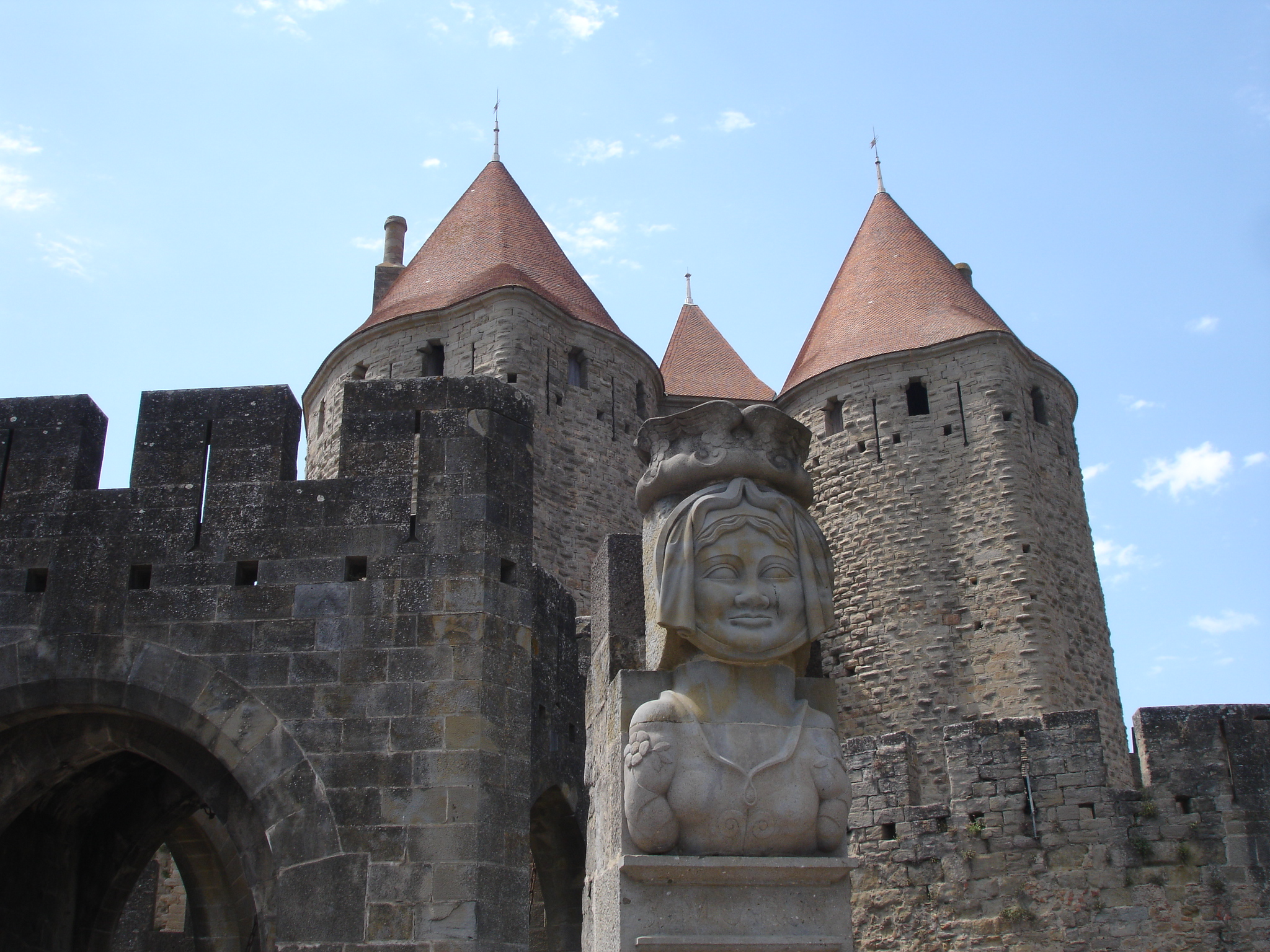 France, Aude (11), Cité de Carcassonne, Dame Carcas